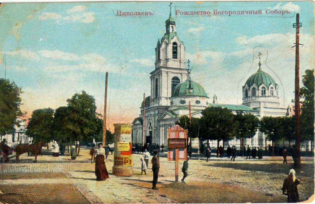 «Николаевъ. Рождество Богородичный Соборъ.»